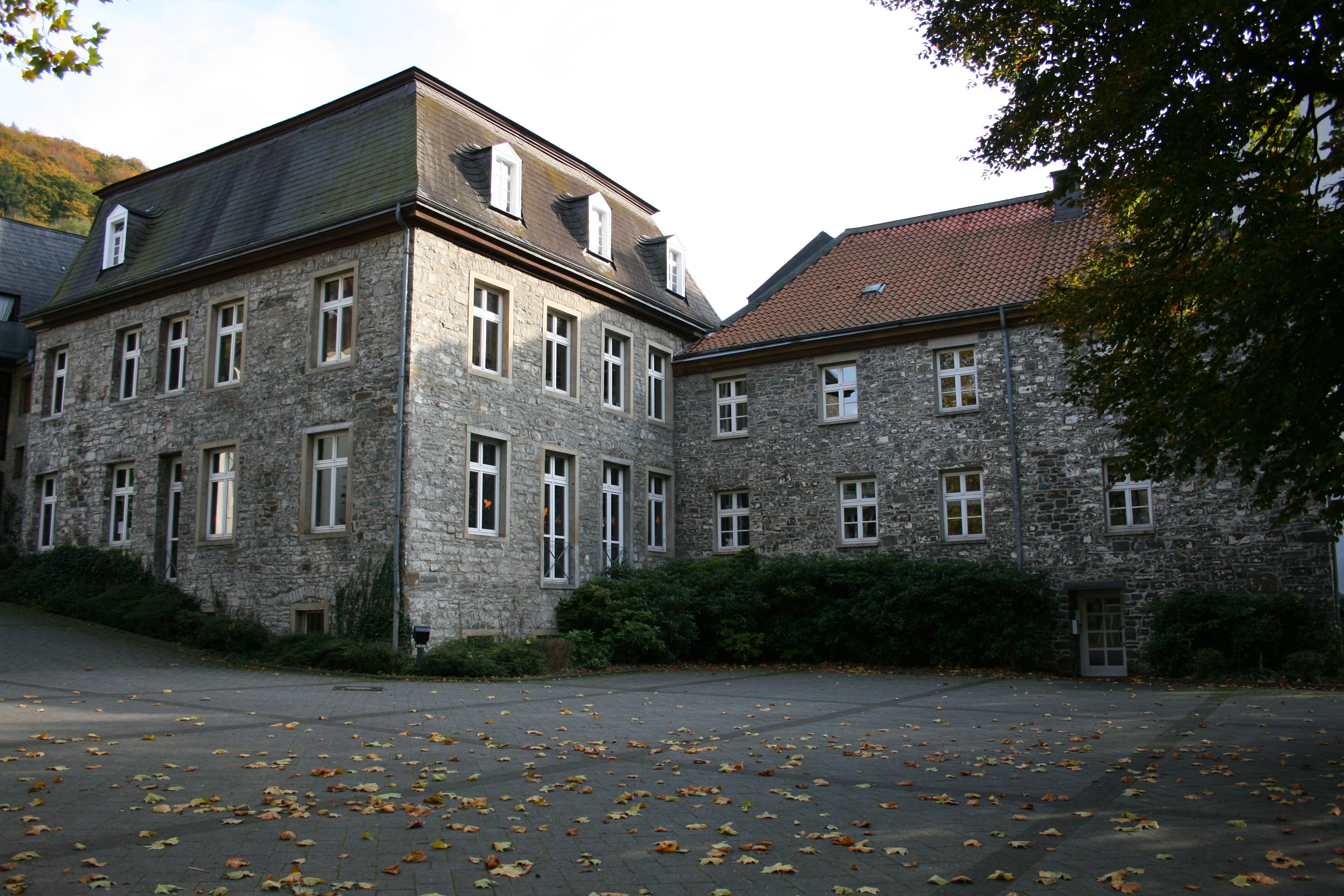 Stadtbücherei an der Marktstraße in Altena